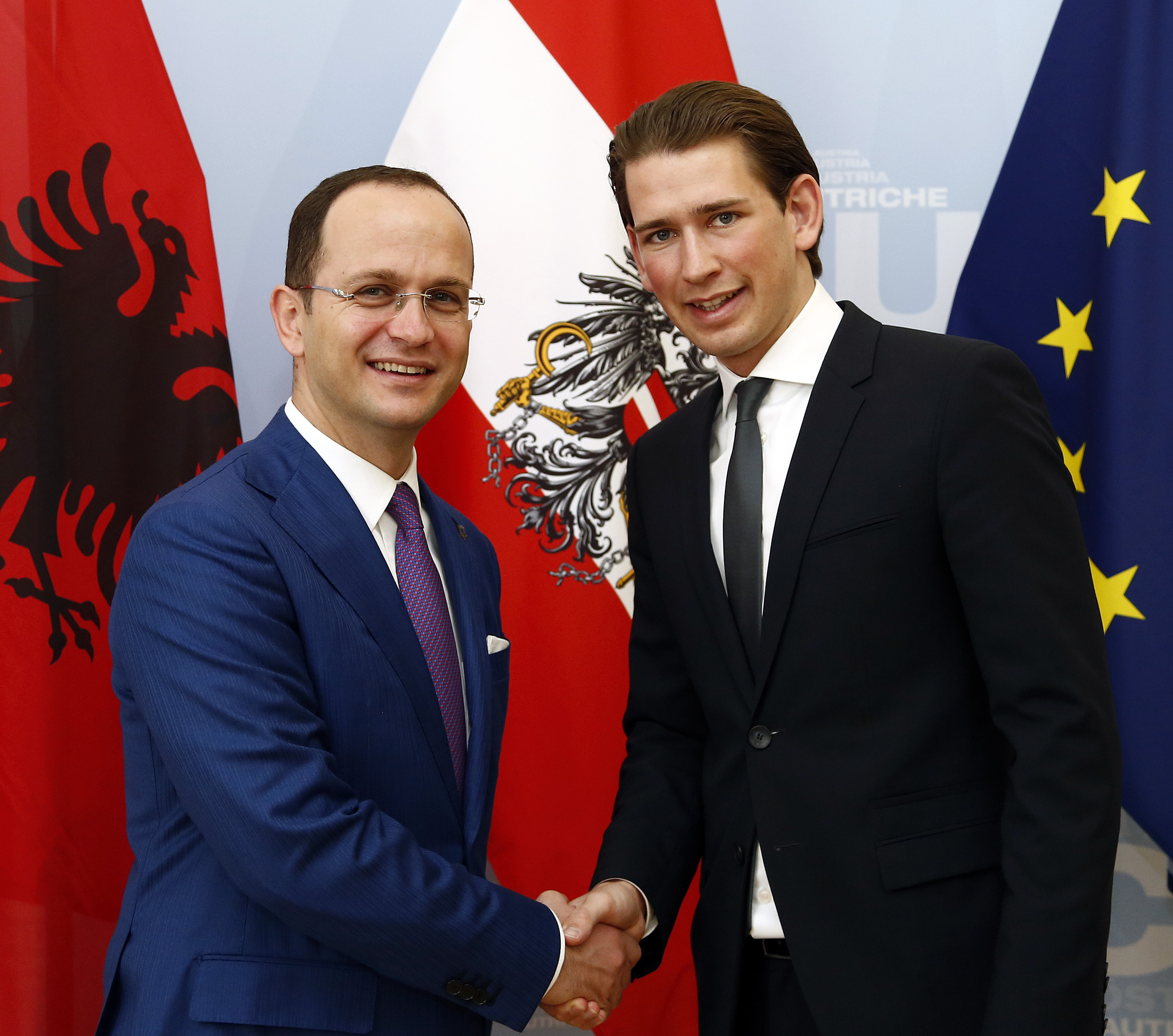 Außenminister Sebastian Kurz trifft den albanischen Außenminister Ditmir Bushati. 05.05.2014, Foto: Dragan Tatic